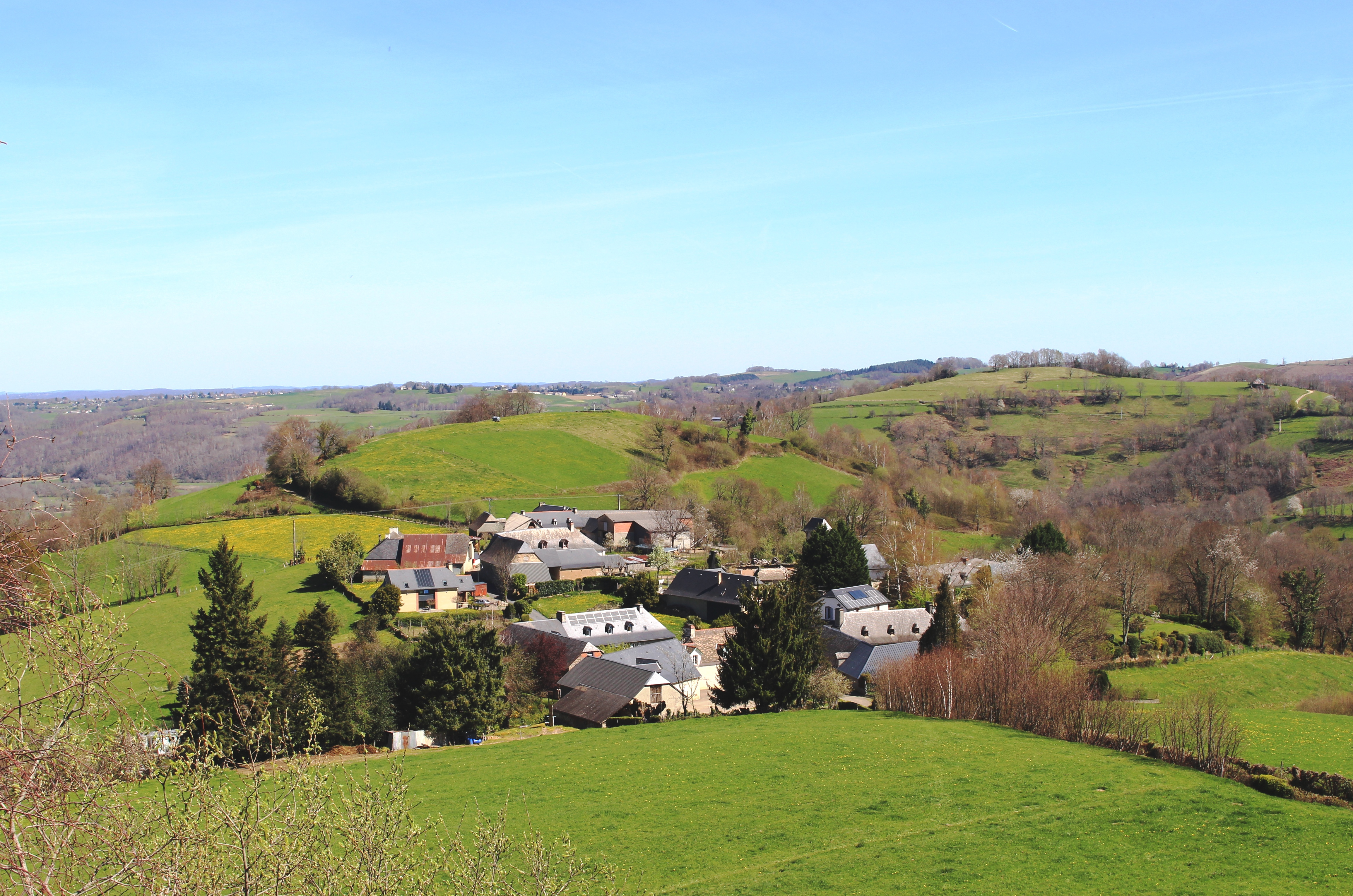 Gez-ez-Angles (Hautes-Pyrénées)